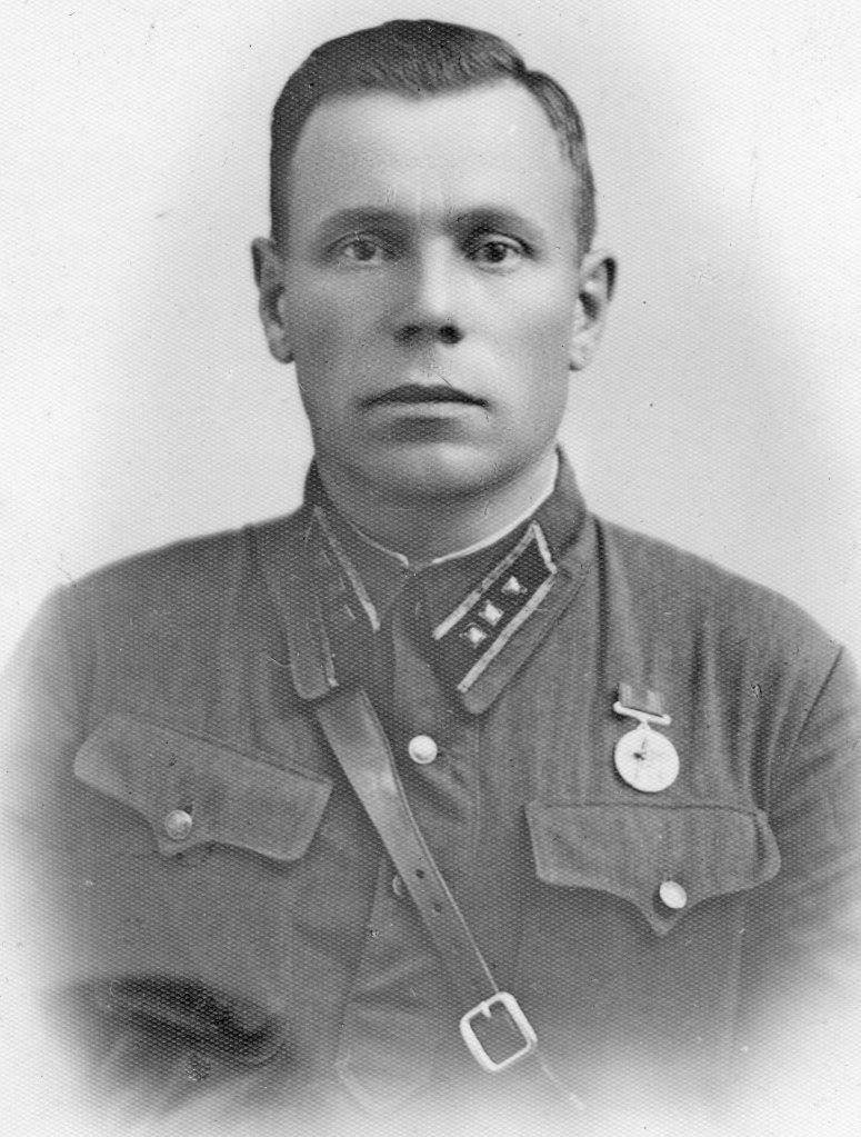 Рябчевский Фёдор Кириллович участник Сталинградской битвы, командир сводного батальона 282-го стрелкового полка внутренних войск НКВД СССР, оборонявшего высоту 135,4 севернее Сталинграда. Фёдор Иванович умер в госпитале в декабре 1942 года.